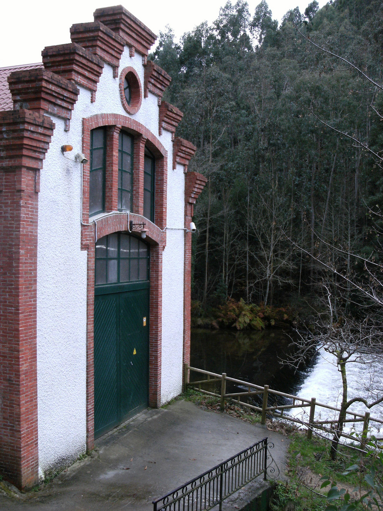 Cercano al Souto da Retorta, en Viveiro (Lugo)